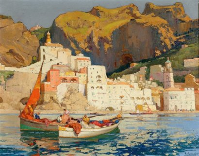 Le port d' Amalfi en 1932, huile sur toile